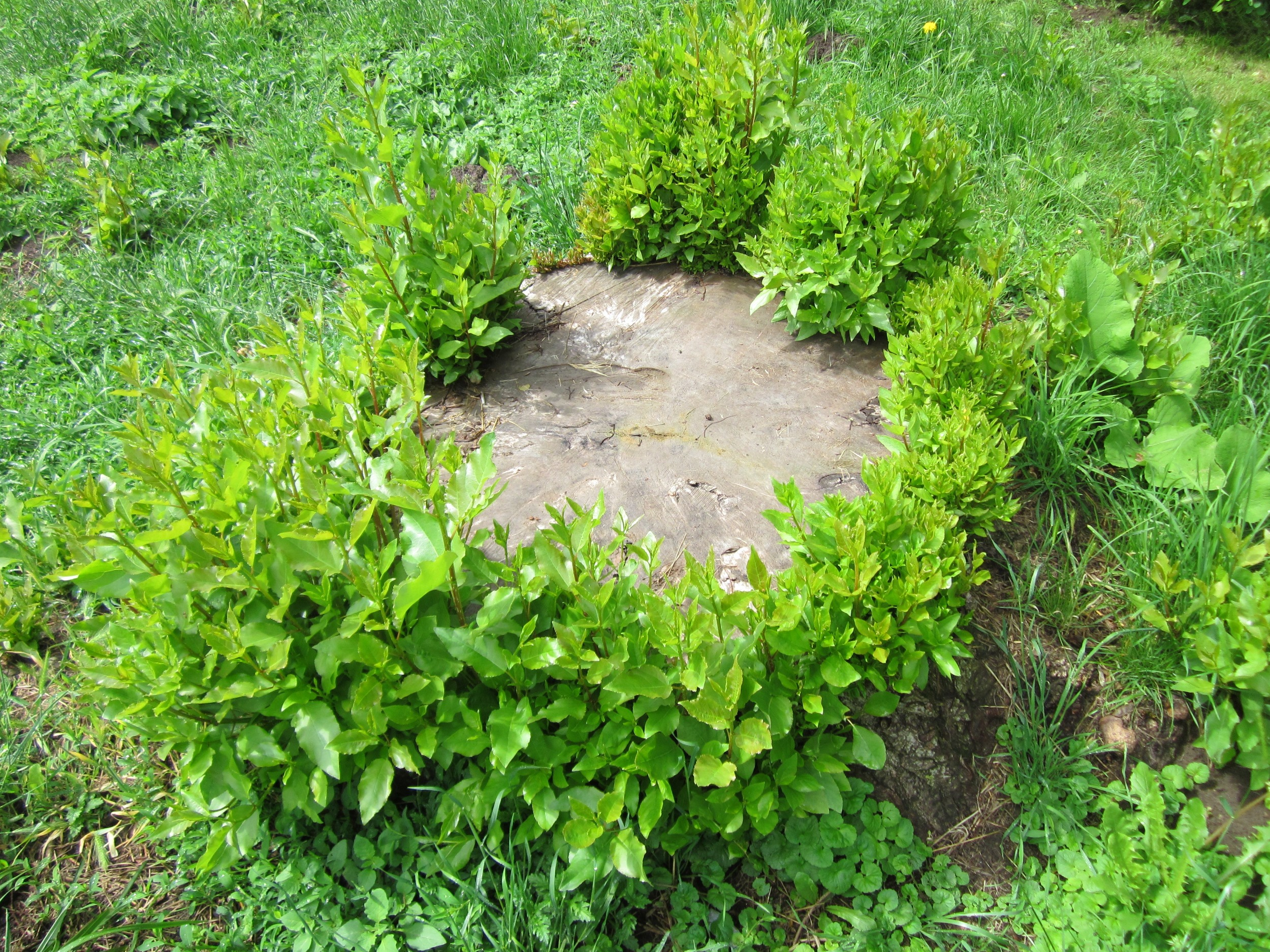 Stumpf einer Hybridpappel (Populus × canadensis) an der Saar in Saarbrücken